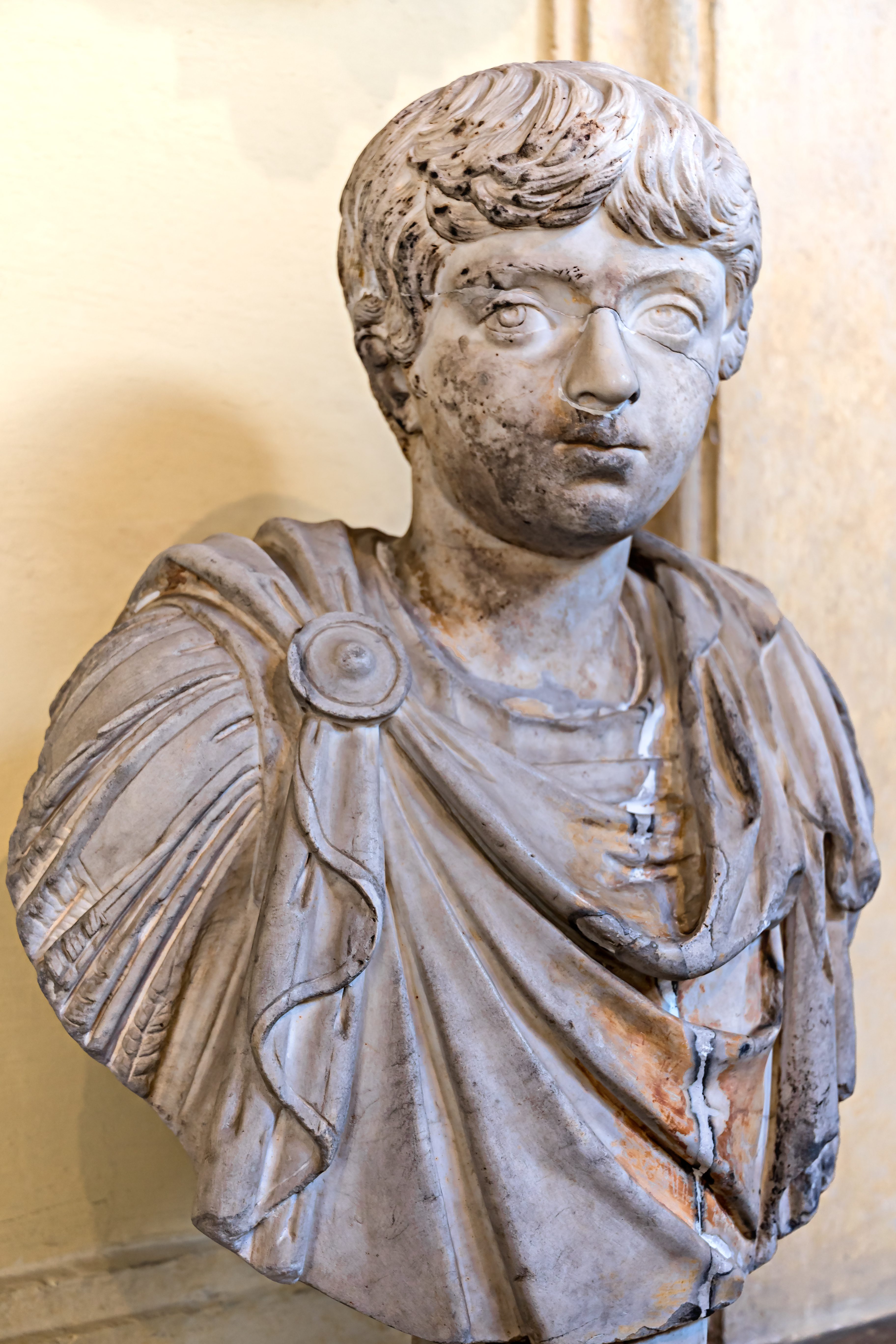 Portrait des kindlichen Geta aus dem Jahr 198 (Vatikanische Museen)